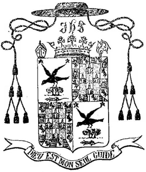 Armorial de Henri de Lespinasse de Saune né à Toulouse le 7 juillet 1850.